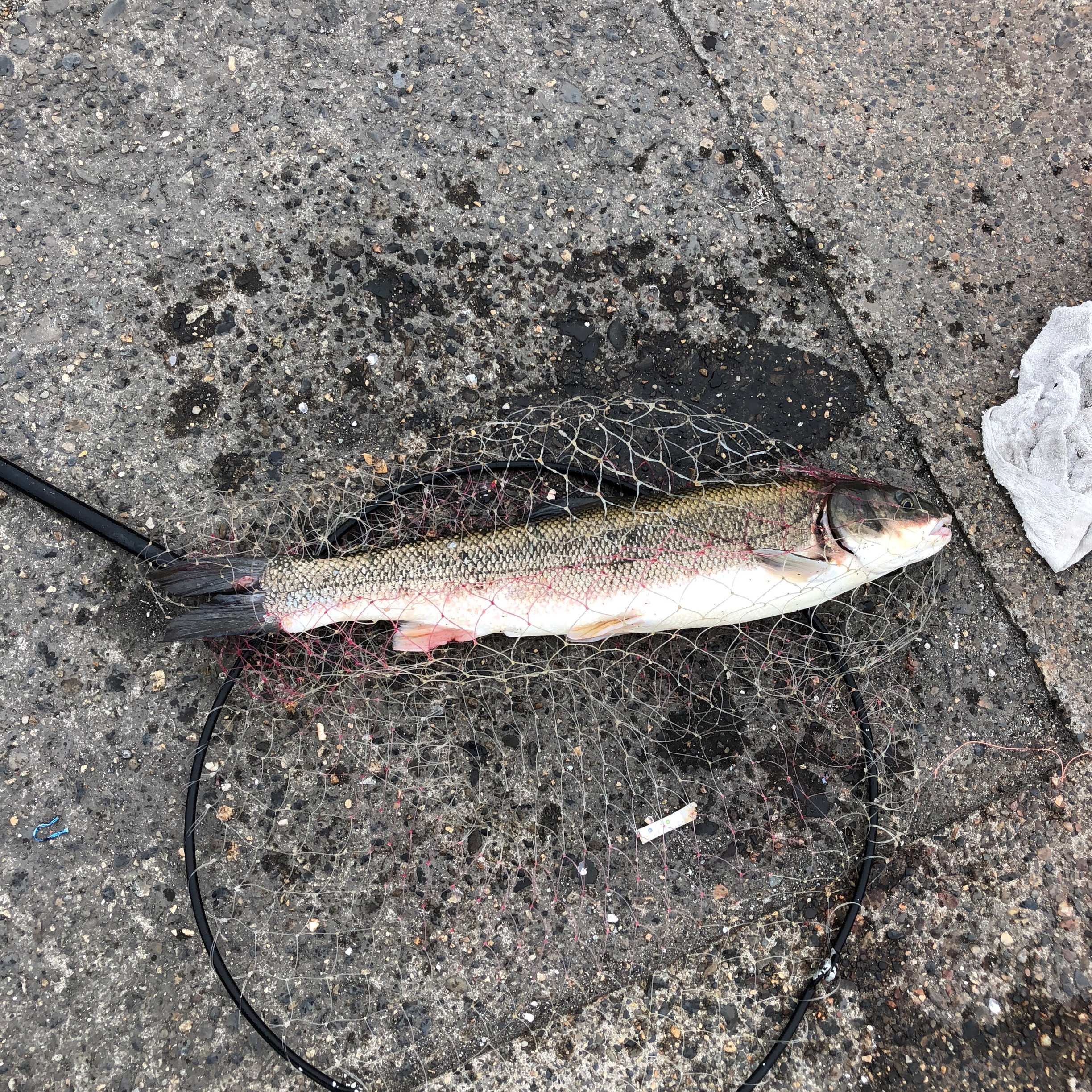 マルタウグイ 2018.8.13 那珂湊漁港